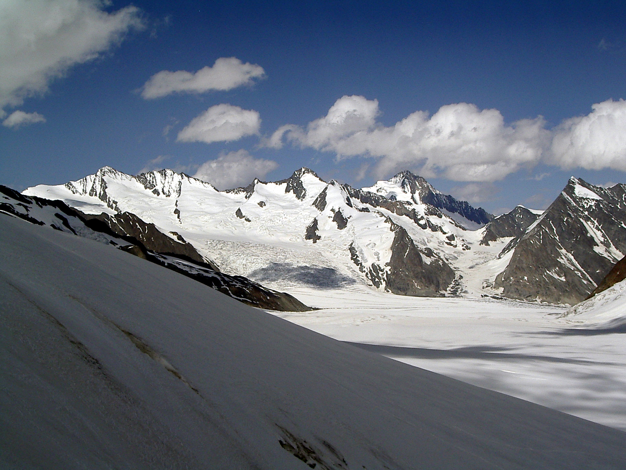 Blick über den Grossen Aletschfirn zum Konkordiaplatz. Jenseits des Konkordiaplatzes links der 300 m hohe Eisbruch des Ewigschneefeldes und rechts der Grüneggfirn, der zur Grünhornlücke emporzieht. Im Hintergrund von links nach rechts die Fiescherhörner, Gross-Grünhorn, Finsteraarhorn (4.274 m, jenseits der Grünhornlücke) und Wannenhorn.